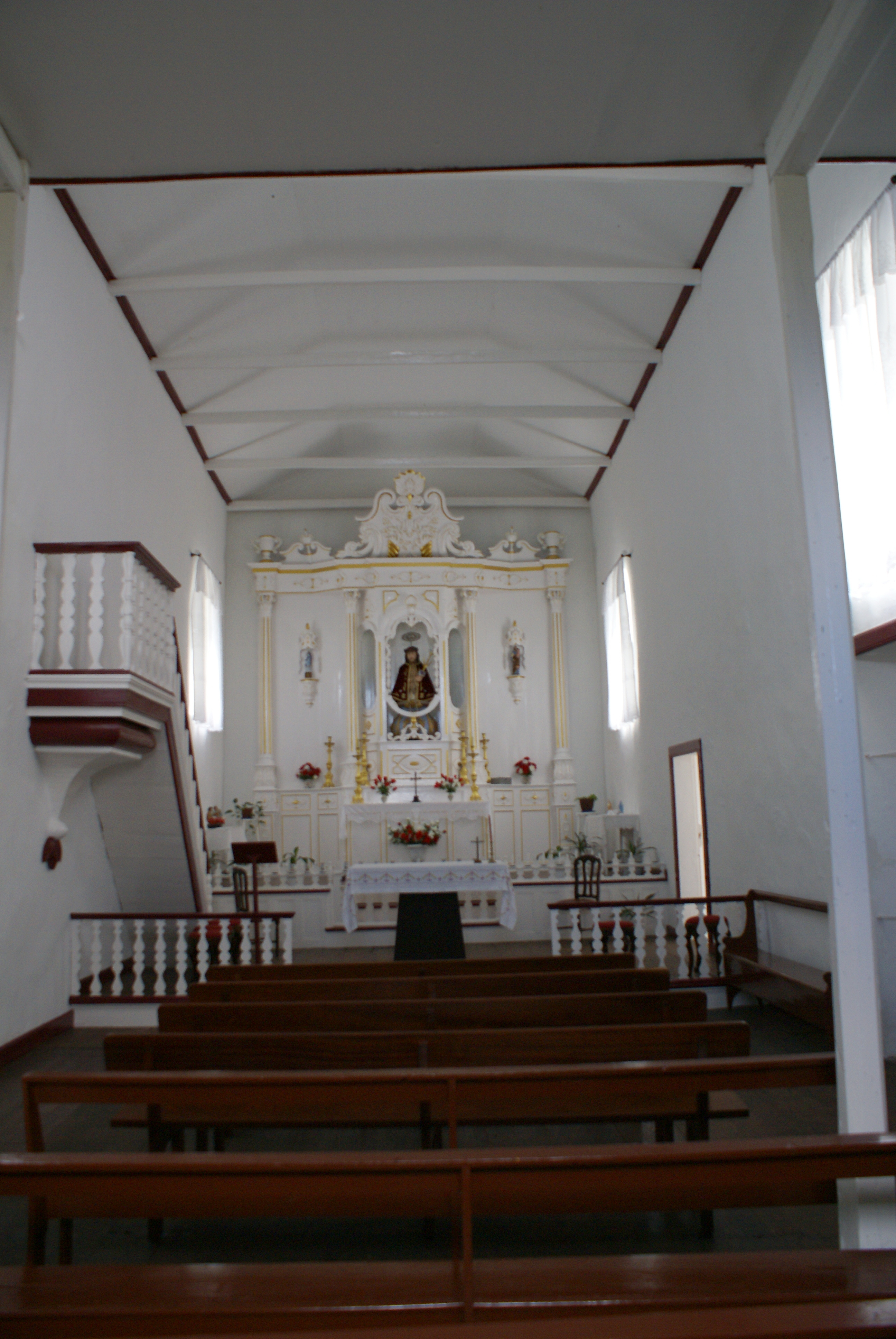 Fajã das Almas, Igreja de Santo Cristo, interior, Manadas, Velas, Ilha de São Jorge, Açores